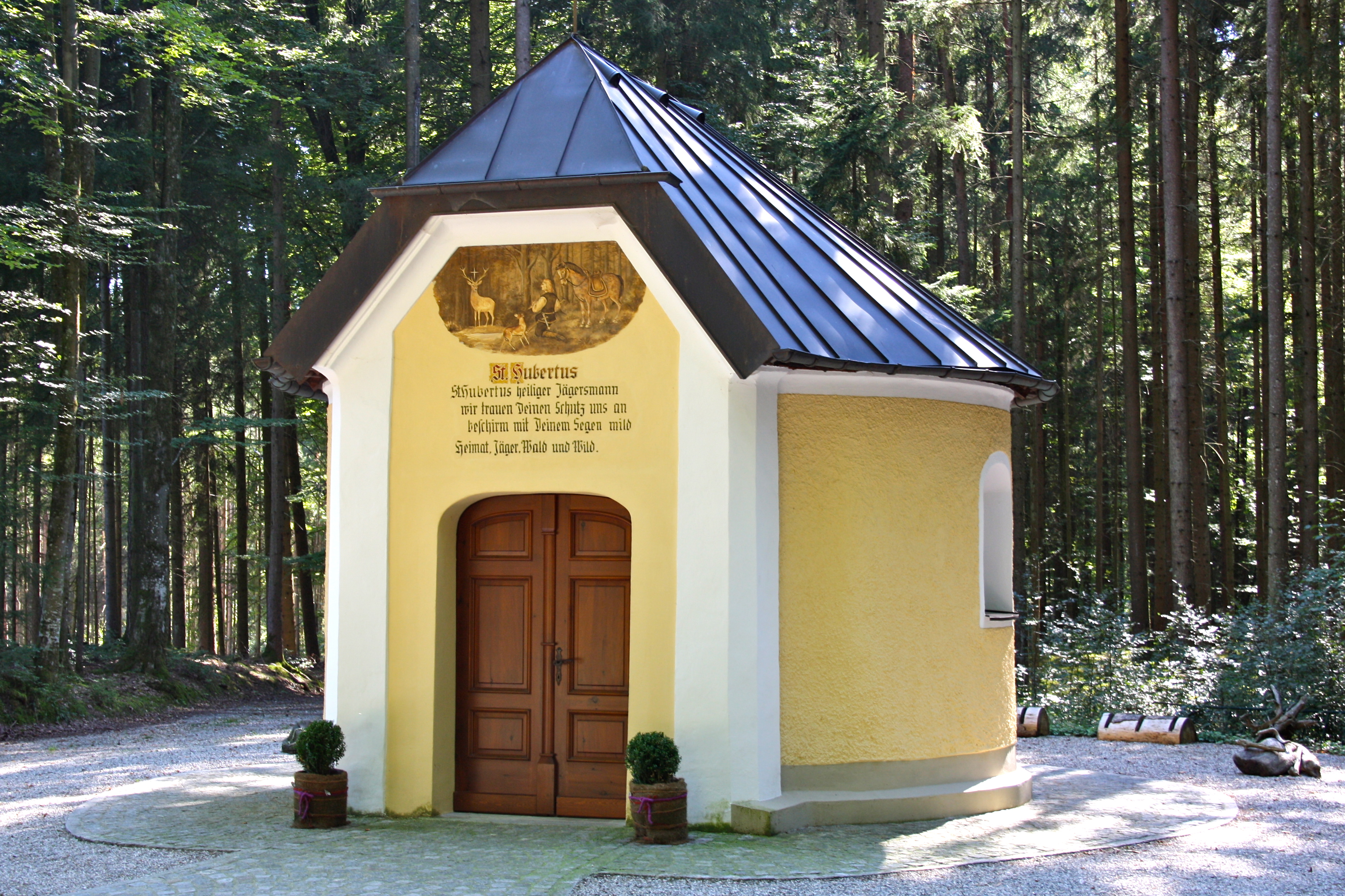 Viper- oder Fieberkapelle